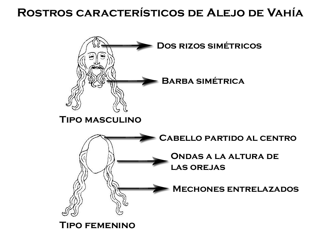 Tipología de los rostros del escultor gótico Alejo de Vahía